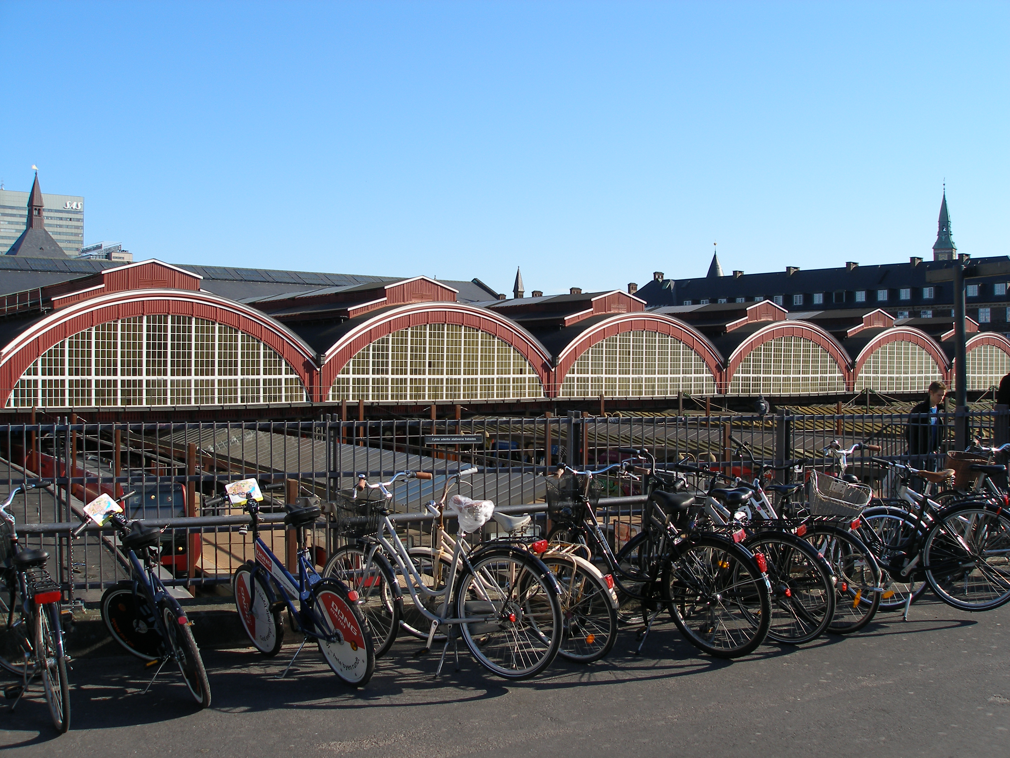 Københavns Hovedbanegård fra Tietgensbroen (Tietgensgade)